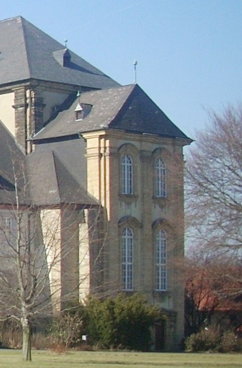 Goslar-Grauhof, ehem. Stiftskirche, Ostanbau von 1741